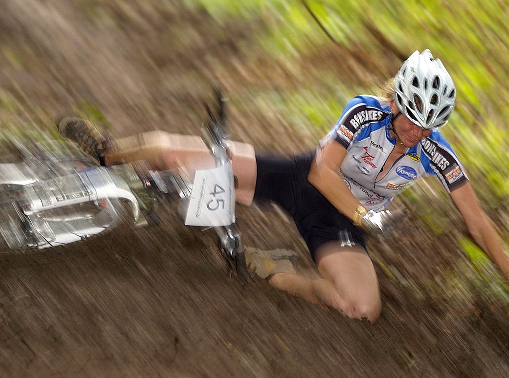 Sturz vom Bike